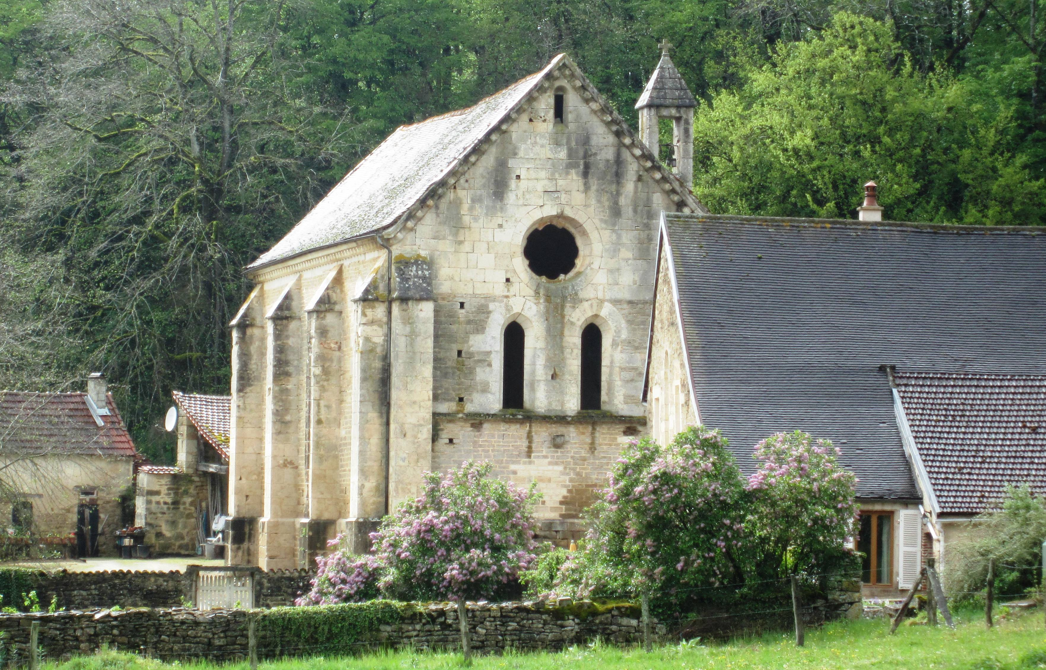 Chapelle de la corvoirie de la chartreuse de Lugny (Côte-d'Or)